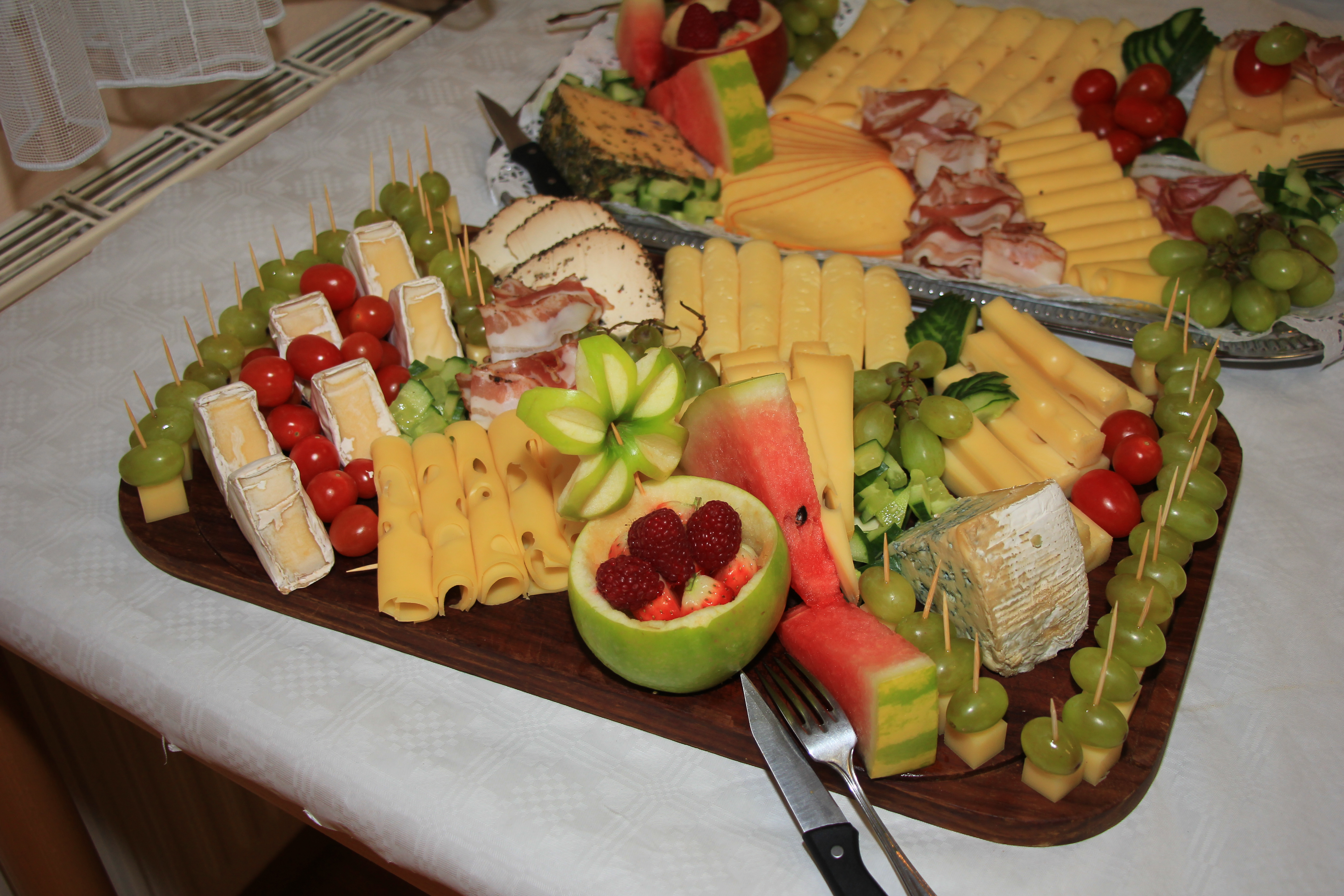 Käseplatte bei einem Büffet